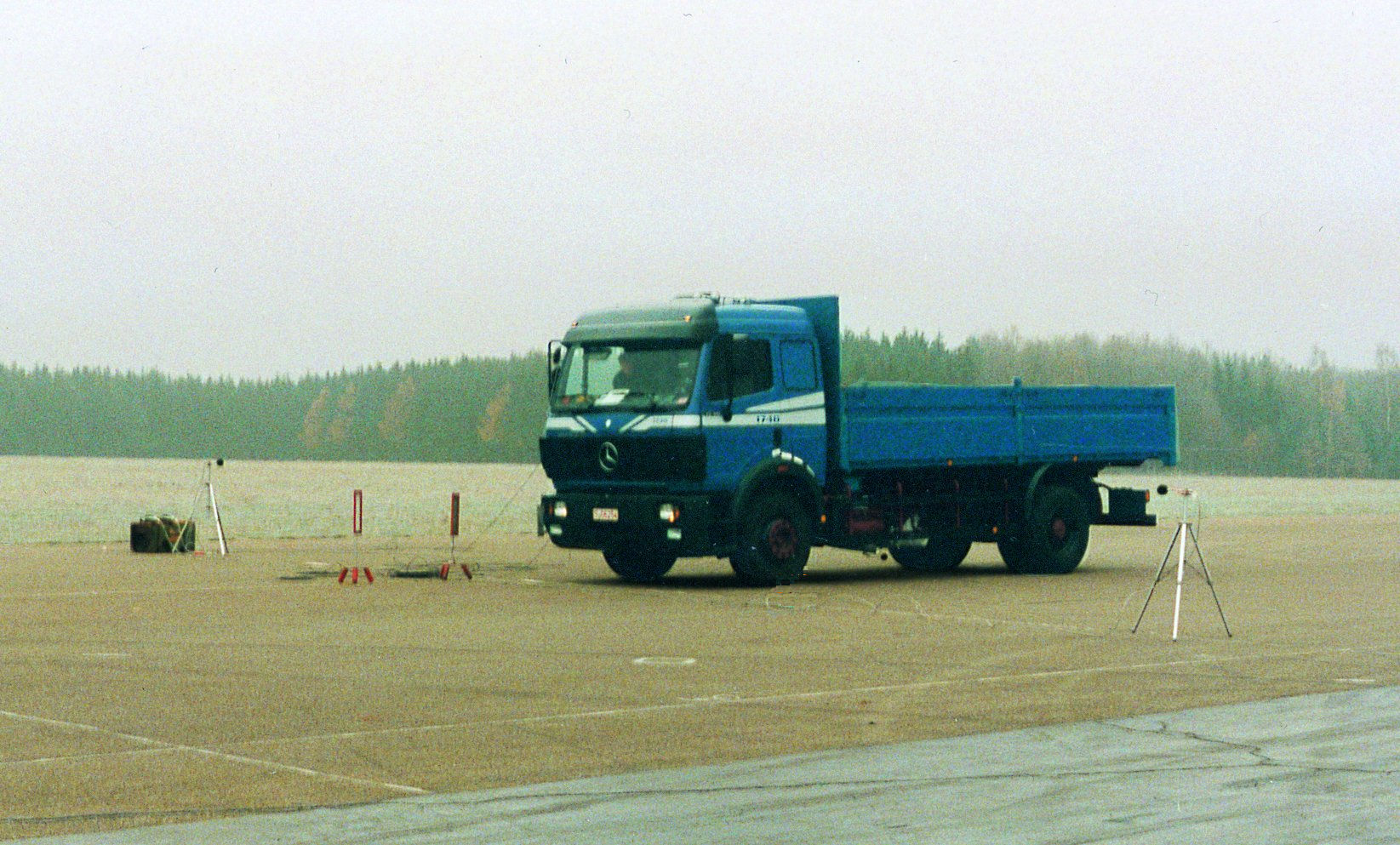 Vorbeifahrtmnessung des Rollgeräuschs (Reifen-Fahrbahn-Geräusch) mit einem Lkw, FKFS-Testgelände Stuttgart